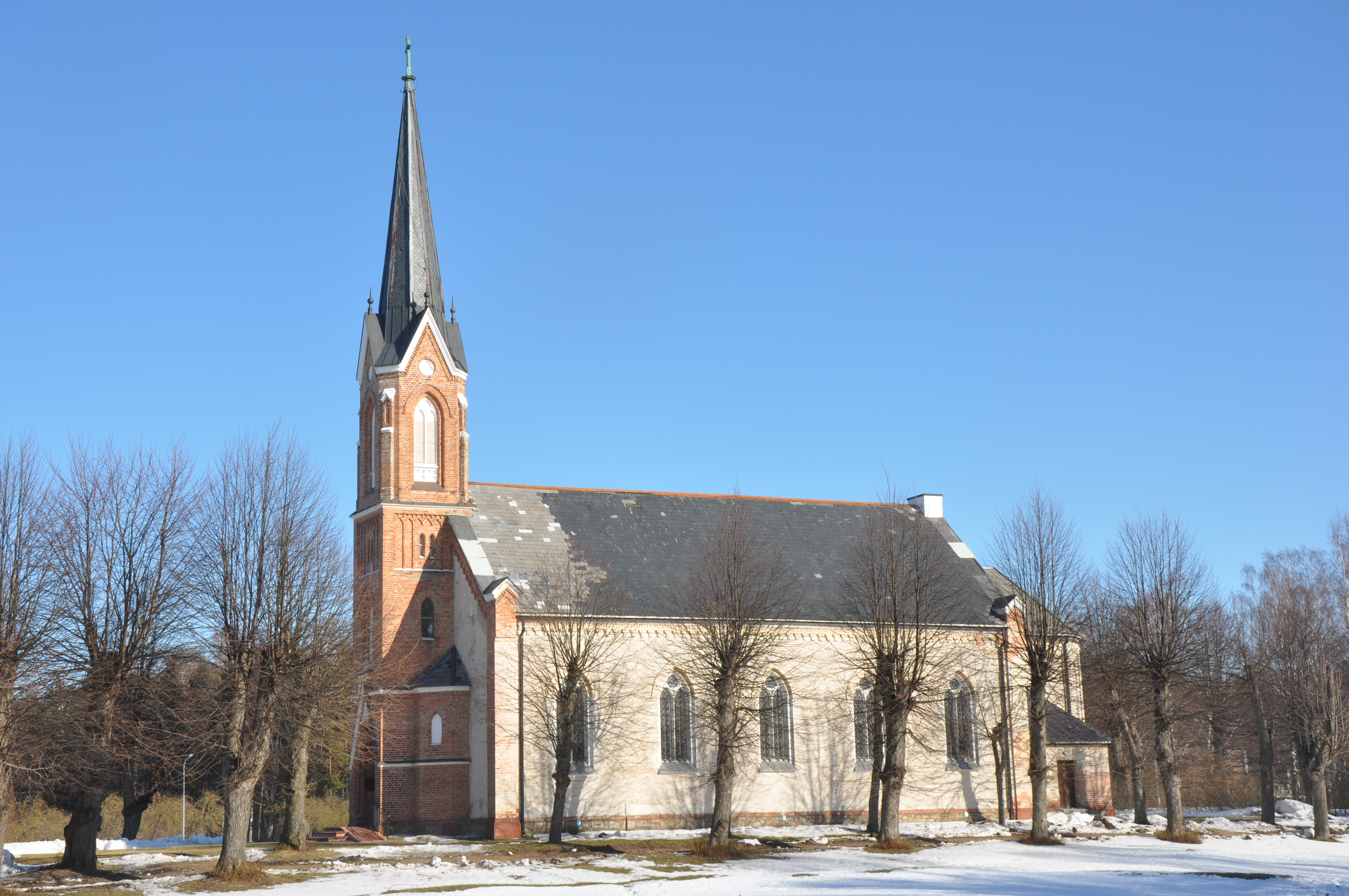 Piņķu Jāņa evenģēliski luteriskā baznīca, Babītes pagasts, Babītes novads, Latvia